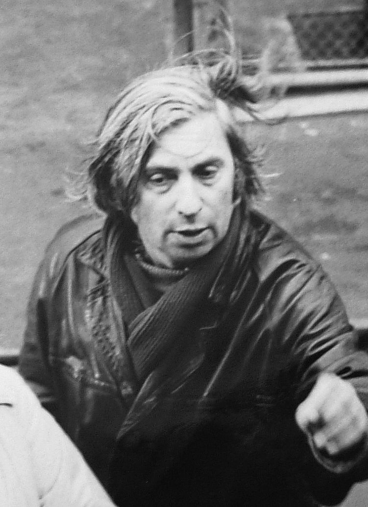 Bacsó Péter a Harmadik nekifutás című film forgatása közben